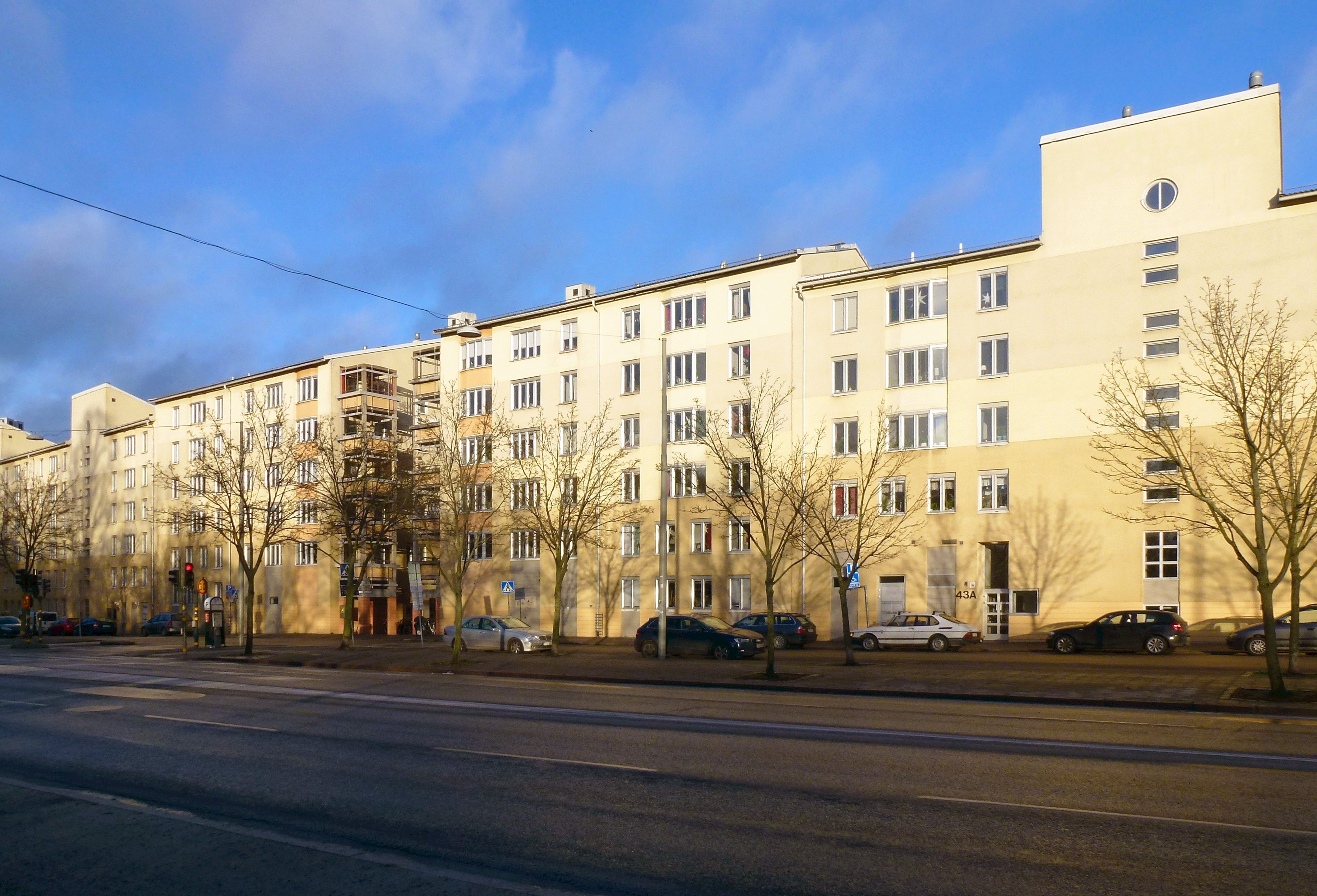 Kvarteret Svärdet, fasader mot Ringvägen